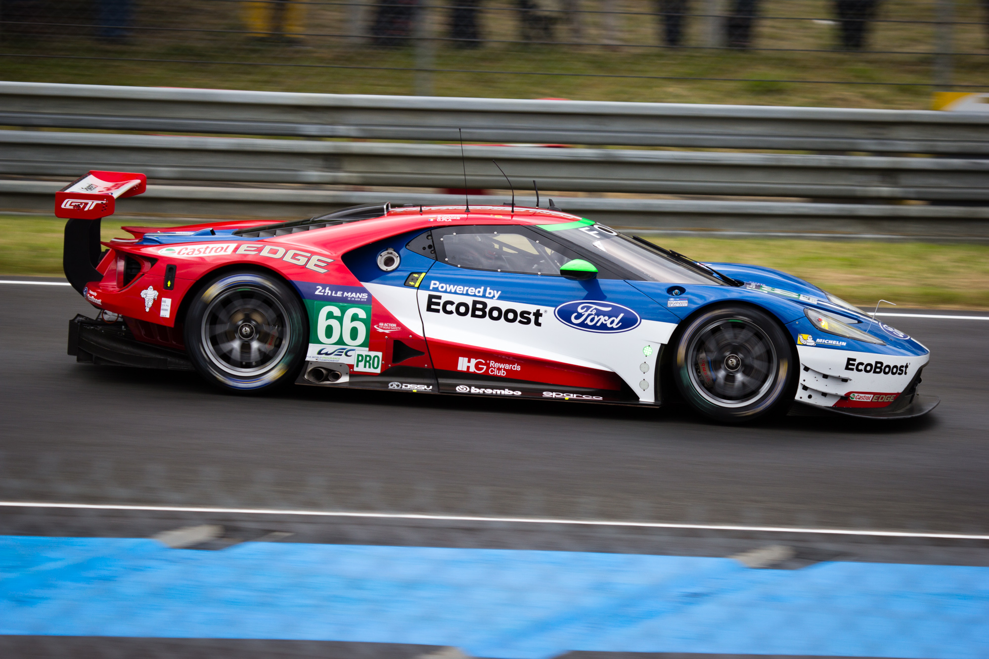 Drivers: Olivier Pla, Stefan Mücke, Billy Johnson